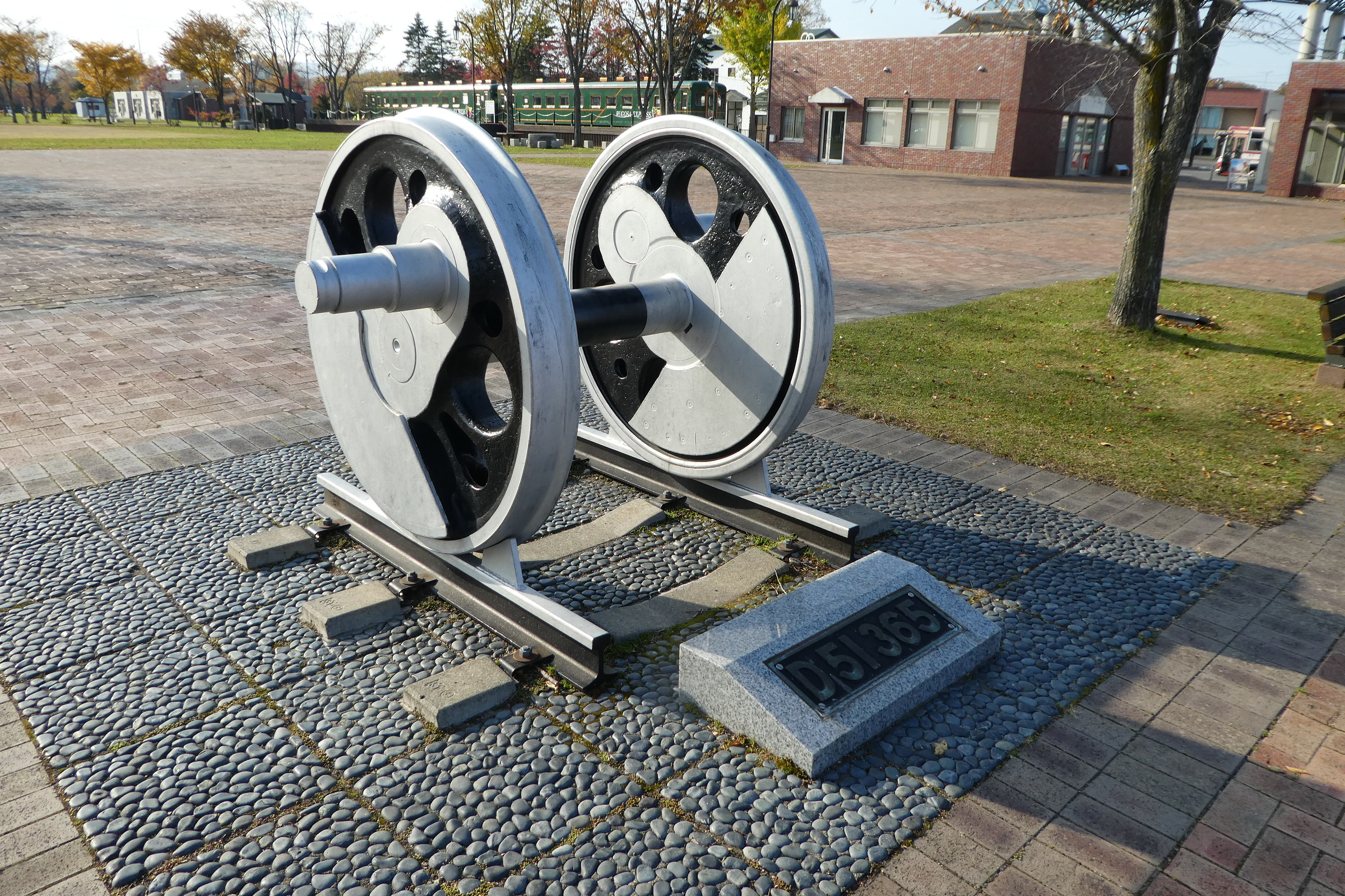 道の駅おこっぺ（興部駅跡地）敷地内に展示されているD51 365号機の動輪